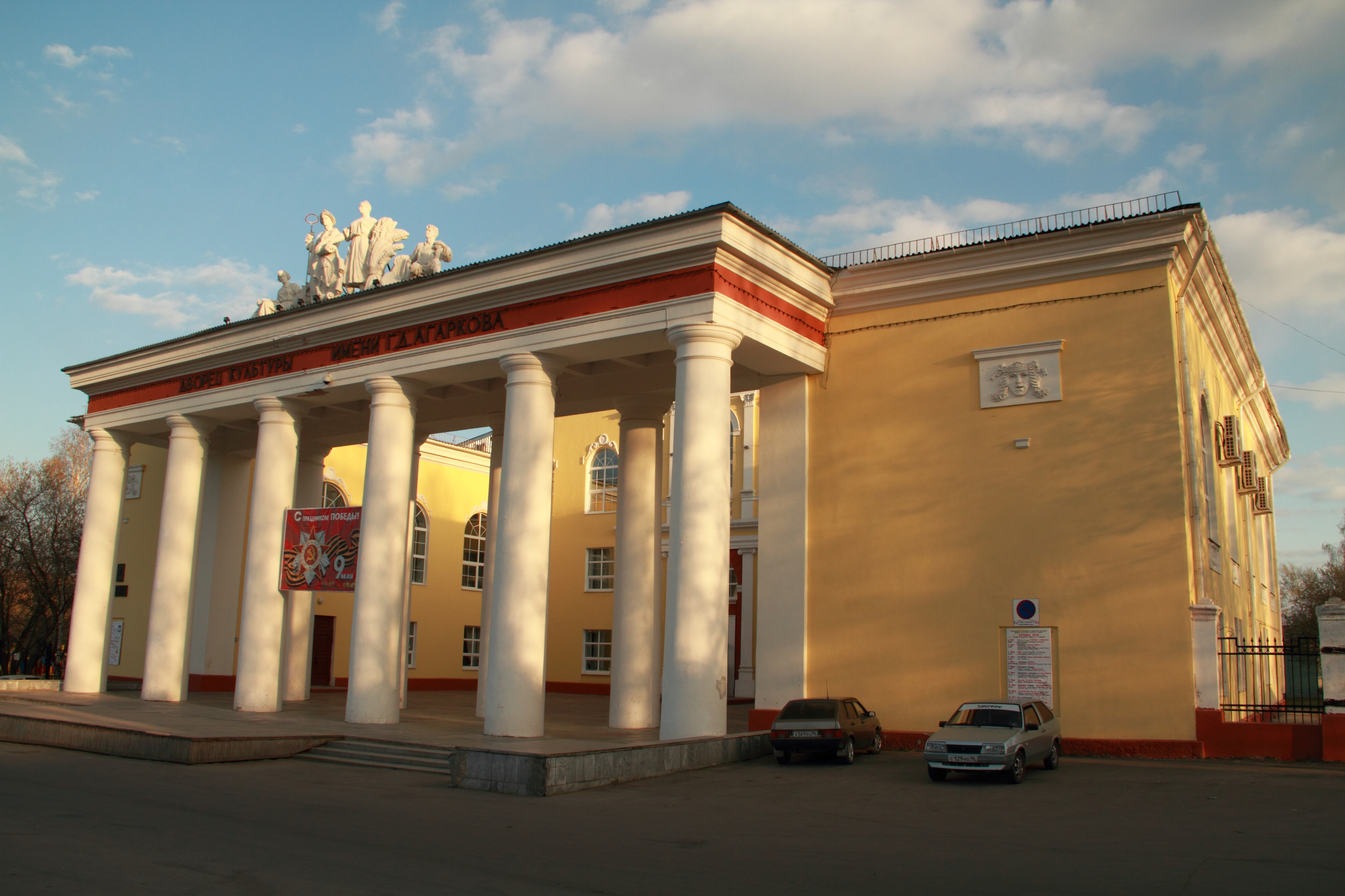 Дворец Культуры имени Г.Д. Агаркова, ранее - им. Первого Мая. Город Верхняя Салда Свердловской области. Построен в 1956 году.